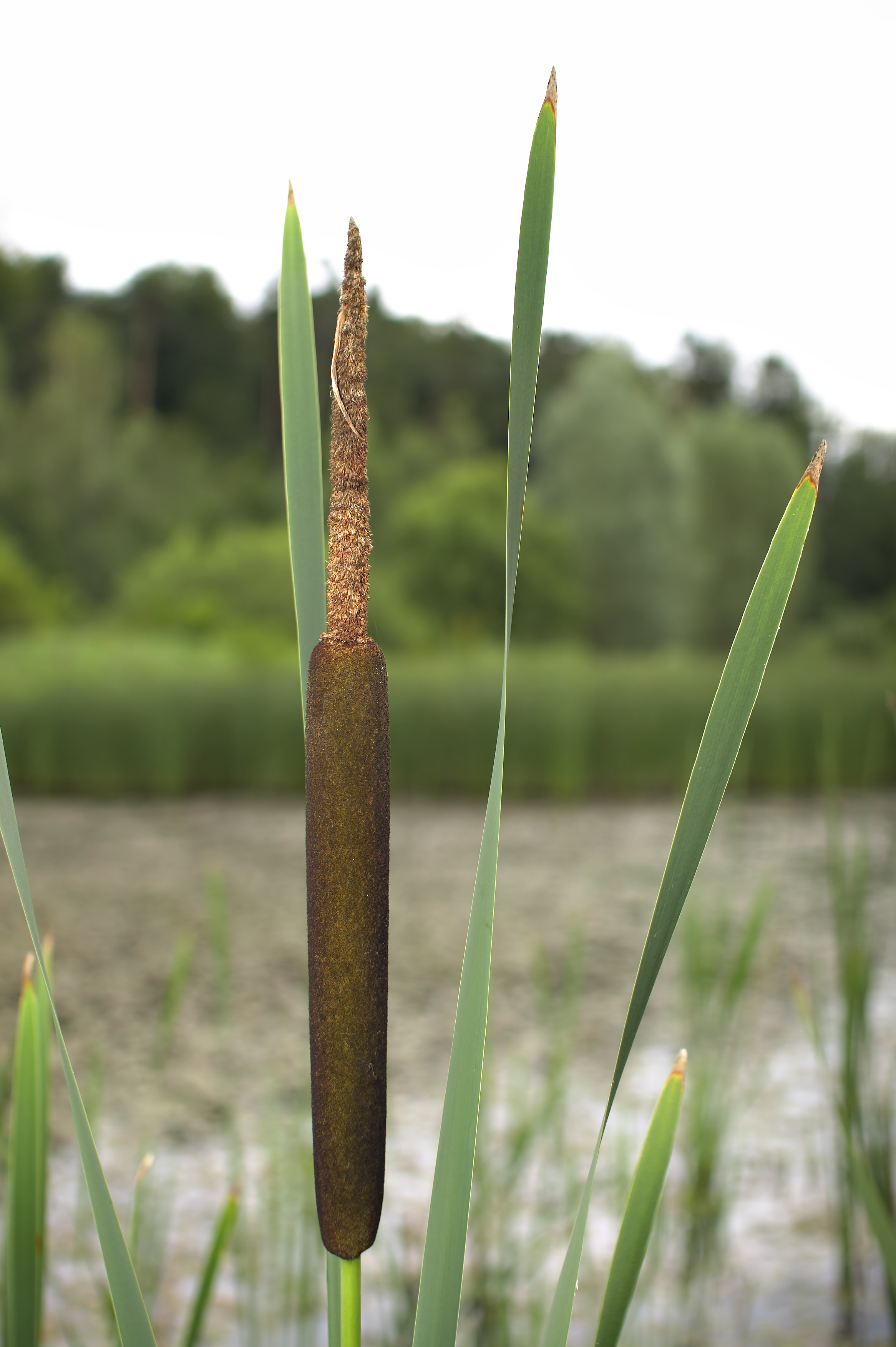 Typha latifolia